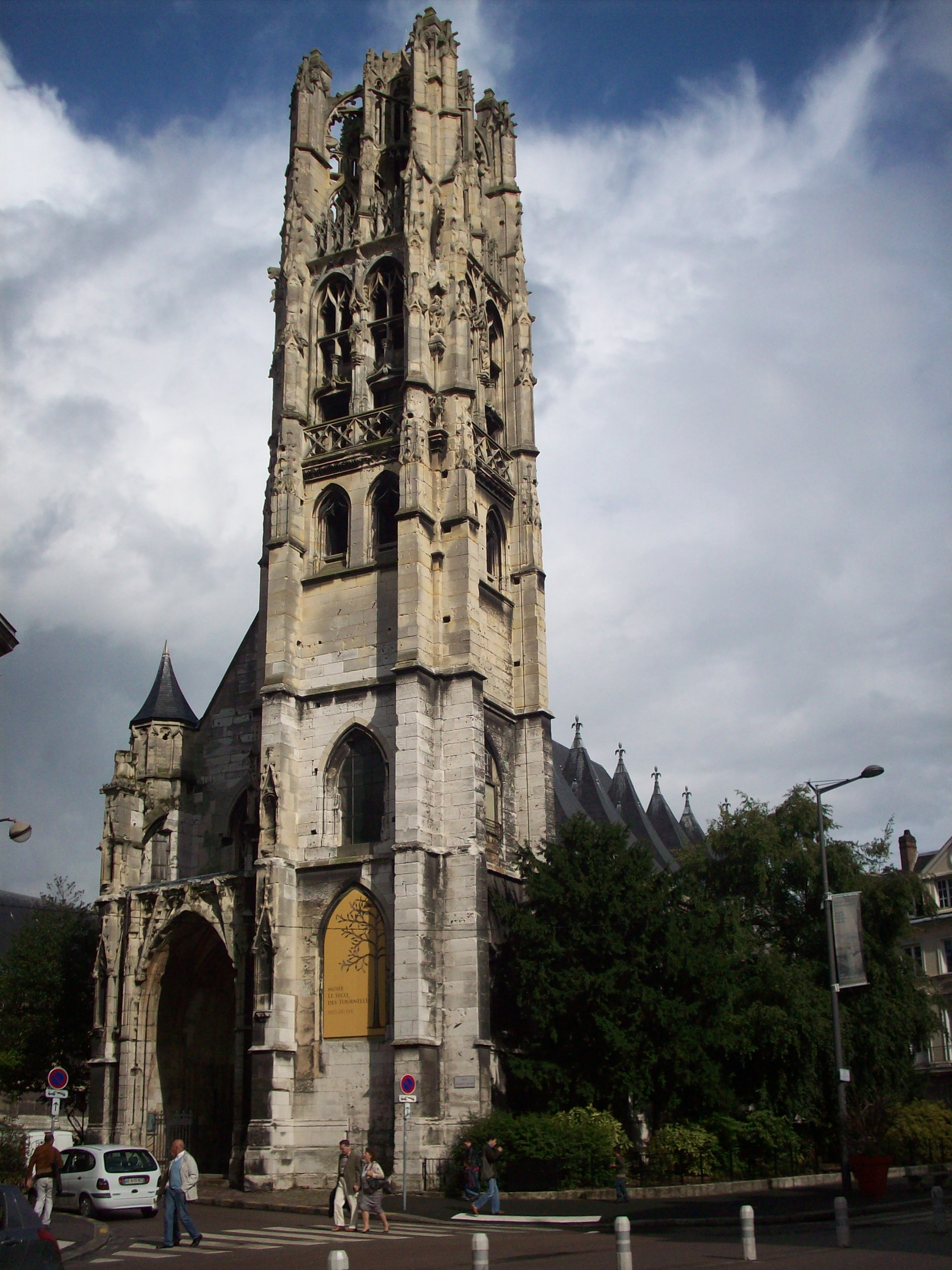 Ancienne église Saint-Laurent, à Rouen, elle abrite aujourd'hui un musée de ferroneries, collectionnées par Le Secq des Tournelles et son père.